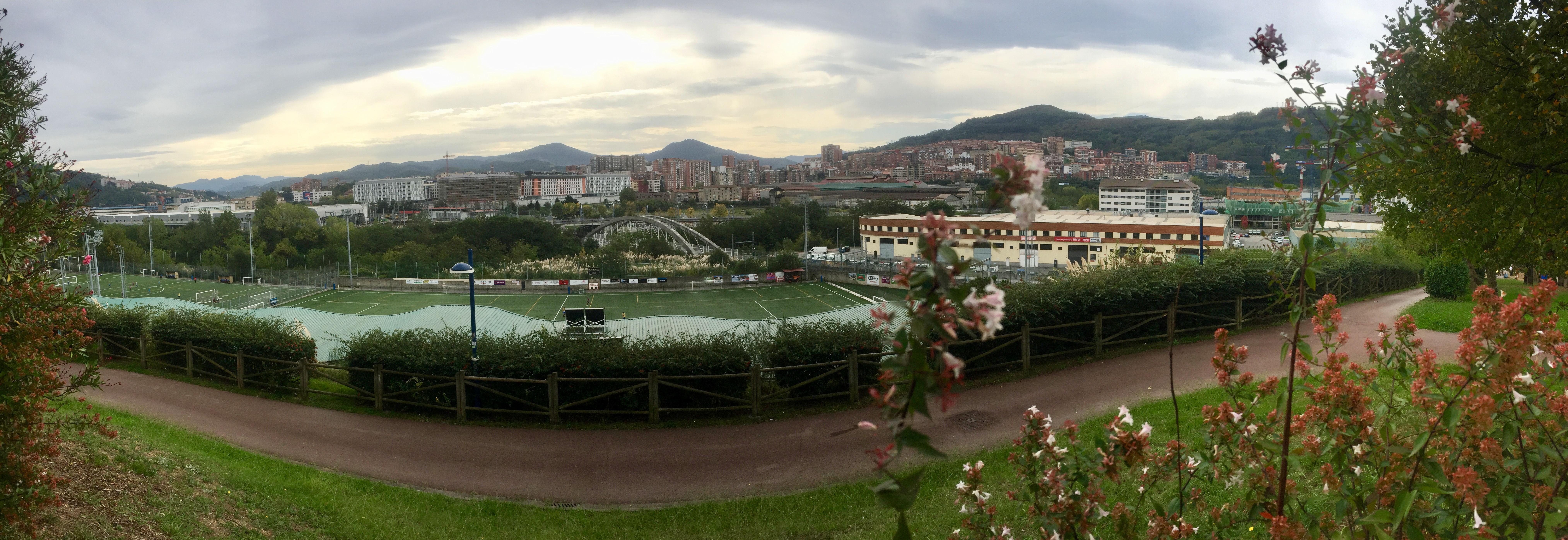 Basauri herria Mandoia, Upo eta Malmasin mendiekin Etxebarritik ikusita.